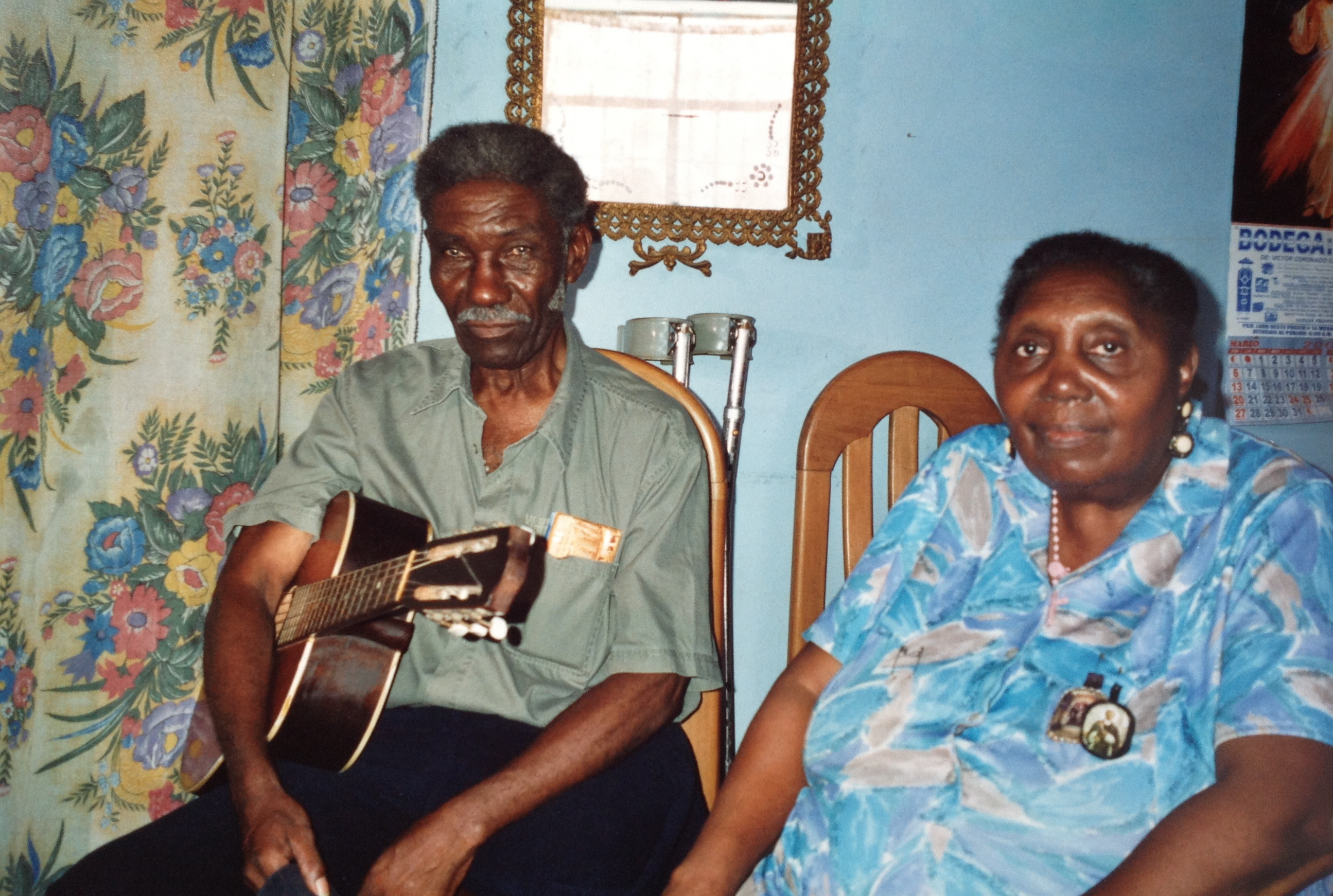 Le musicien à El Carmen - Chincha - Ce village abrite la communauté afro-péruvienne la plus importante du Pérou - Prise de vue effectuée durant le tournage du Documentaire "Negra" réalisé par Franck Schneider